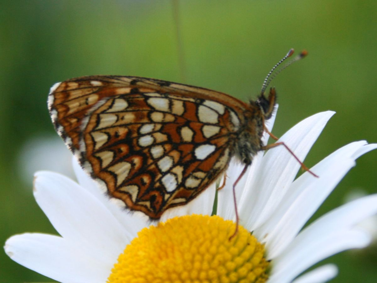 Baldrian-Scheckenfalter (Melitaea diamina), Edelfalter (Nymphalidae) - Österreich/Austria/Autriche: Oberösterreich, Hausruckviertel, Moorwiese ca. 2 km S Forsthaus Redltal, ca. 570 m s.m.